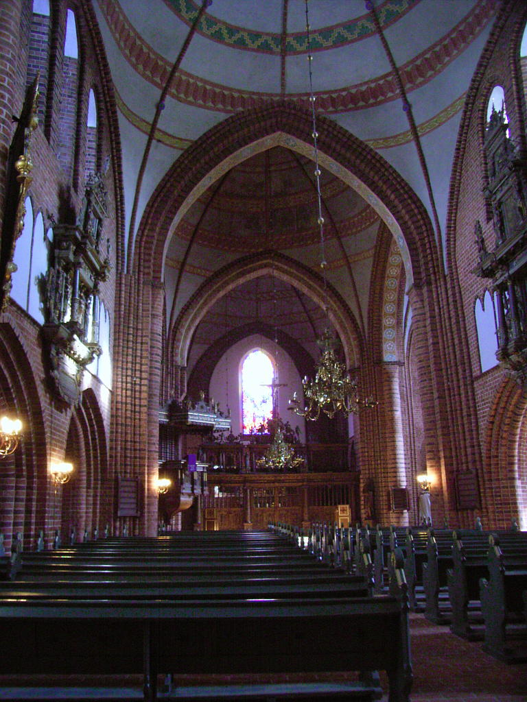 Innenansicht des Meldorfer Doms (St. Johanniskirche in Meldorf)